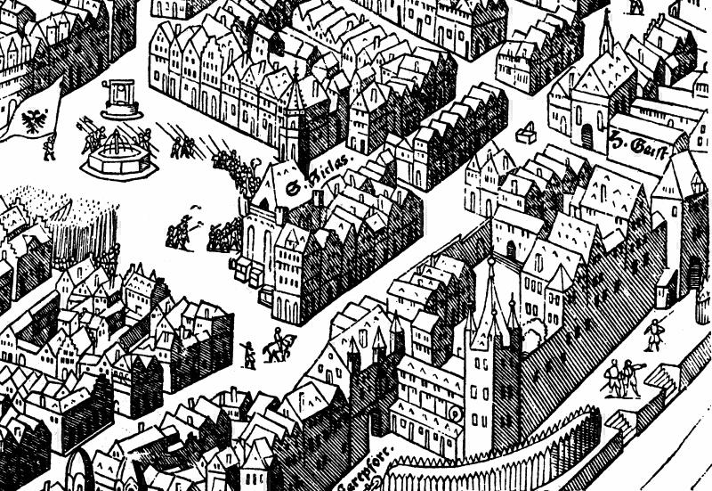 Frankfurt am Main: Nördliches Mainufer, Hafenkai Im Vordergrund der Rententurm des Saalhofs mit vier Ecktürmchen und Kegeldach, davor eine große Palisade. Links daneben die Fahrpforte, durch die der Weg zum Römerberg und zur Nikolaikirche führt. Der Brunnen auf dem Römerberg noch ohne Justitia-Plastik, dazu ein weiterer Brunnen auf dem Samstagsberg. Von links kommt ein Landsknecht mit kaiserlicher Fahne aus der Neuen Kräme. Hinter dem Saalhof die Saalgasse, auf die ein Tor in der Mauer des Saalhofs führt. Kleiner als der Rententurm der ältere viereckige Bergfried in der Mauer zum Hafen. Rechts vom Saalhof am Hafenkai der Torturm der Heiliggeistpforte, dahinter das Hospital zum Heiligen Geist.